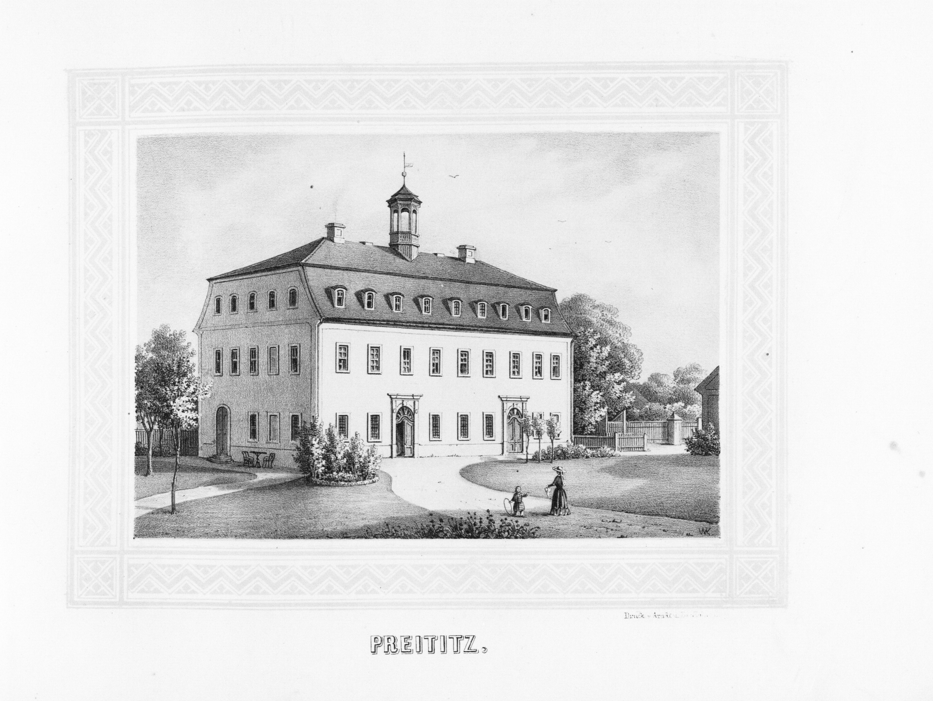 Preititz aus: Album der Rittergüter und Schlösser im Königreiche Sachsen Markgrafenthum Oberlausitz Section: III